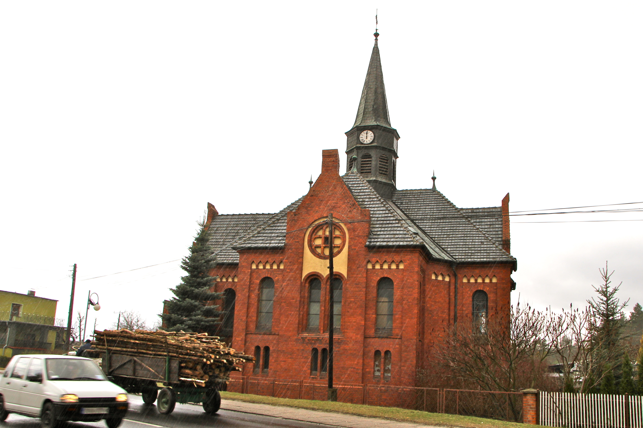 Kup – dawny kościół ewangelicki, od 1974 rzymskokatolicki p.w. Matki Boskiej Nieustajacej Pomocy, 1894